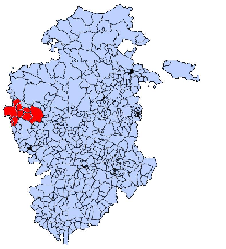 Municipios de la mancomunidad Odra-Pisuerga en la provincia de Burgos